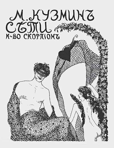 Николай Феофилактов. Обложка к книге М.Кузмина «Сети». 1908. Картон, тушь, перо, заливка. ГТГ